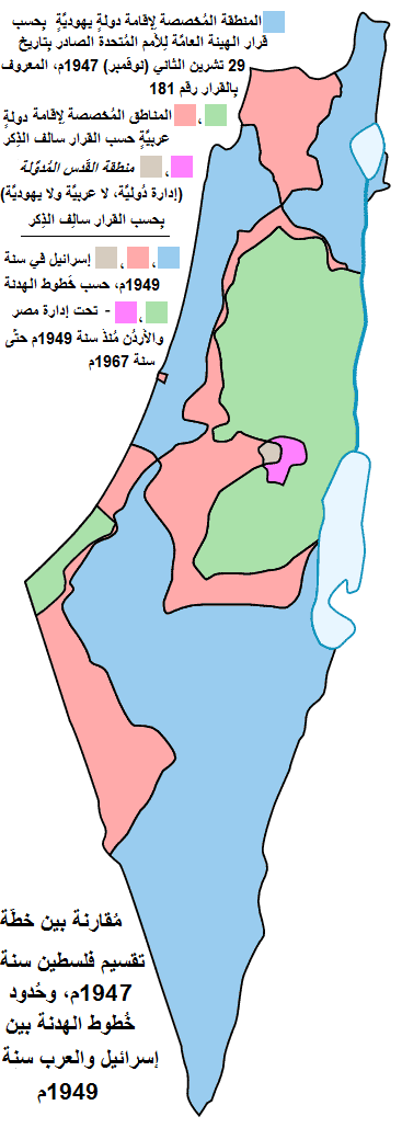 خريطة تقسيم فلسطين بين العرب واليهود بِحسب قرار الأُمم المُتحدة رقم 181 الصادر سنة 1947م، وخُطوط الهدنة التي اتفق عليها العرب وإسرائيل سنة 1949م بعد الحرب العربيَّة الإسرائيليَّة الأولى، المعروفة بِحرب النكبة. يُضاف إليها حُدود المناطق التي خضعت لِلإدارتين الأُردُنيَّة والمصريَّة حتَّى سنة 1967م التي خسرها العرب بعد حرب النكسة.